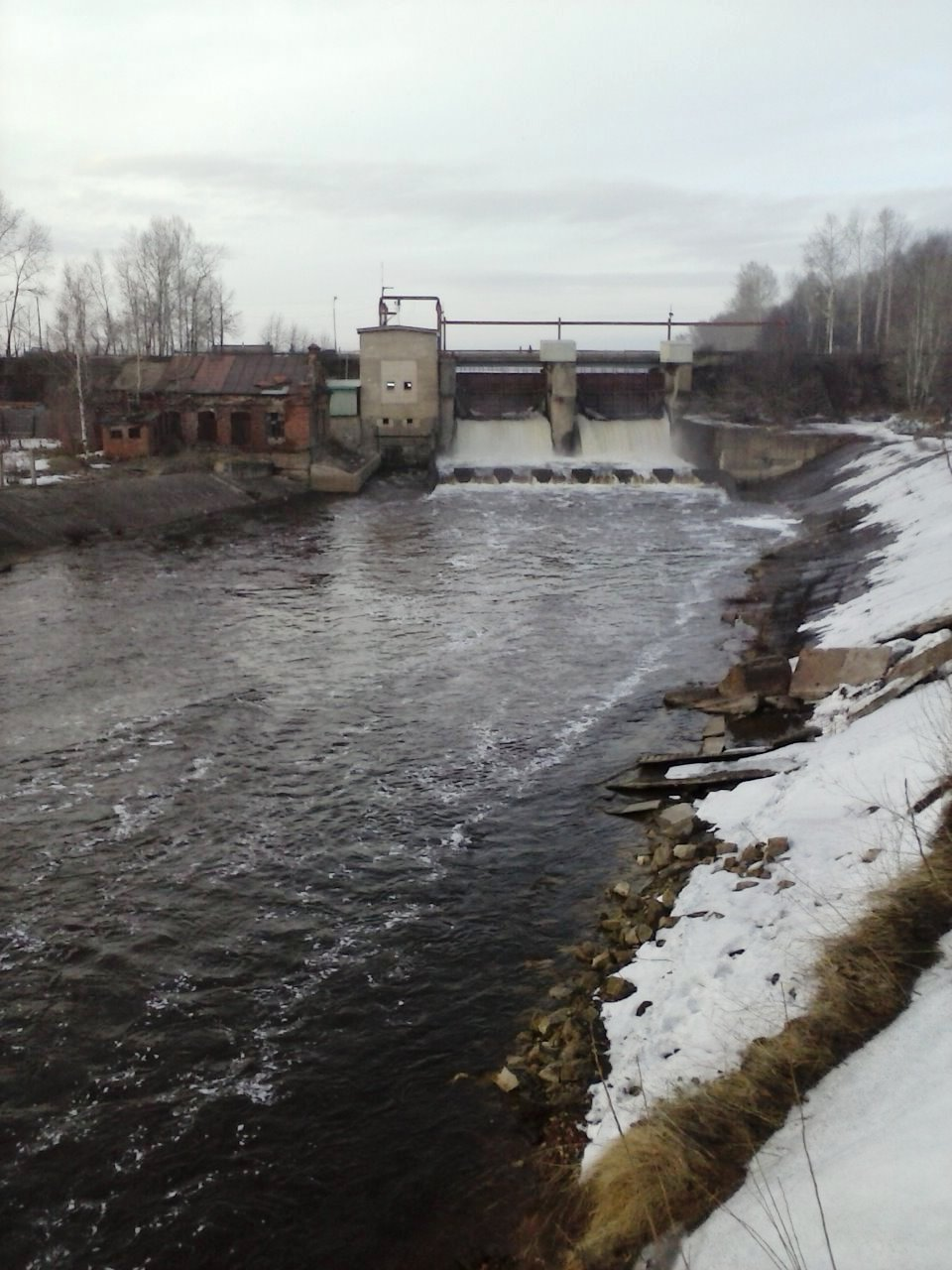 Река Белая Холуница вытекает с дамбы Белохолуницкого пруда